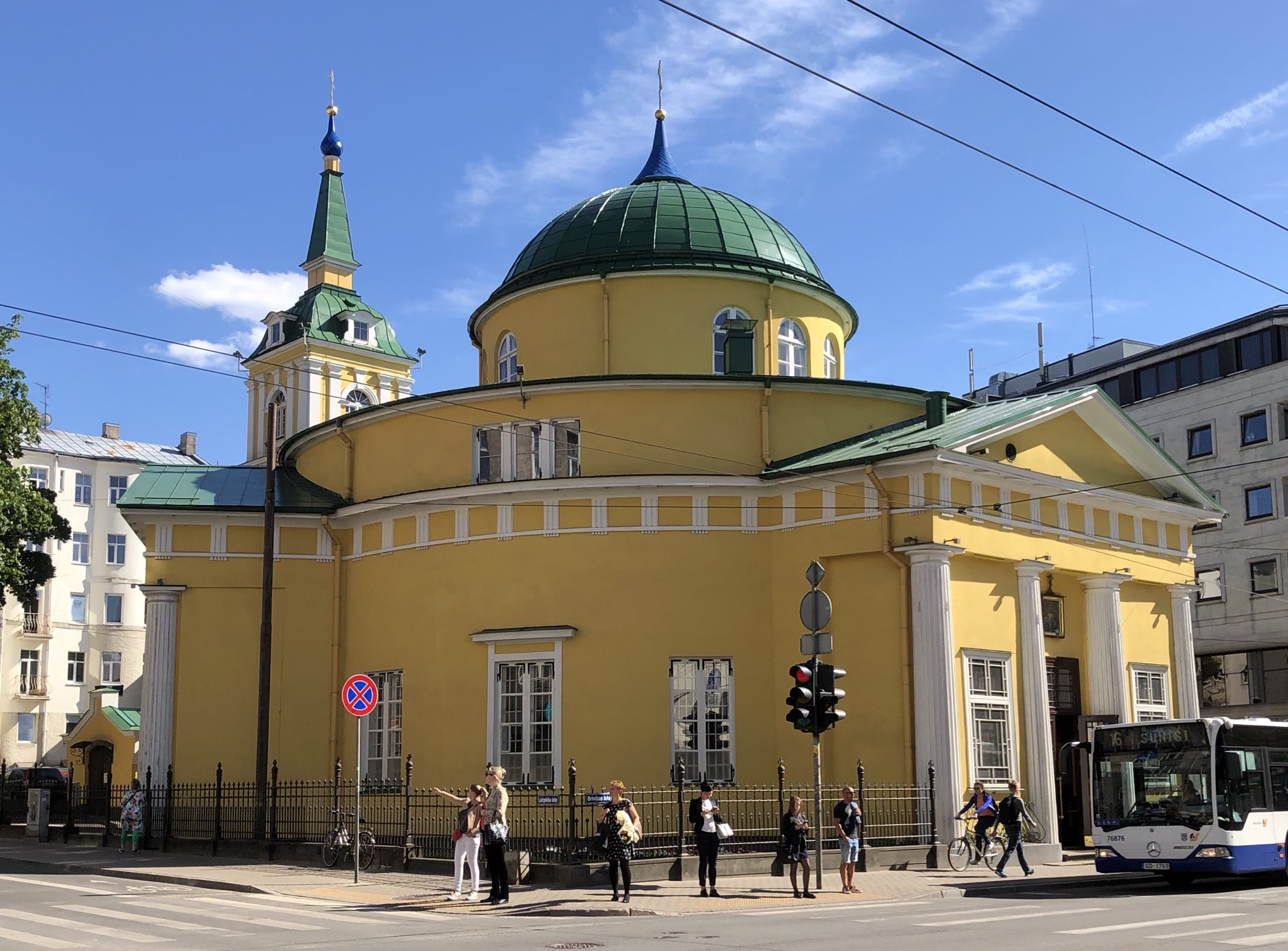 Alexander Nevsky Kirche in Riga